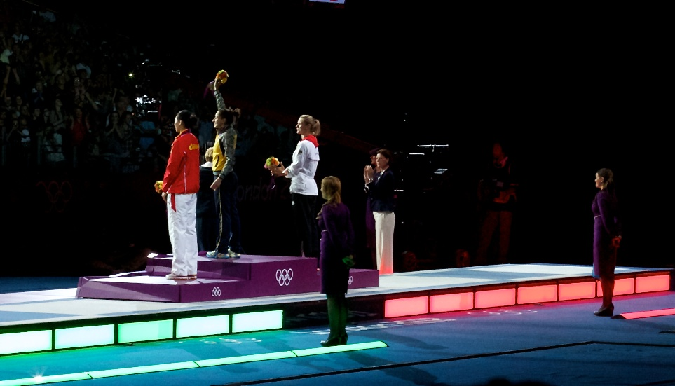 Yana Shemyakina (GOLD, Ukraine), Britta Heidemann (SILVER, Germany) and Sun Yujie (BRONZE, China)